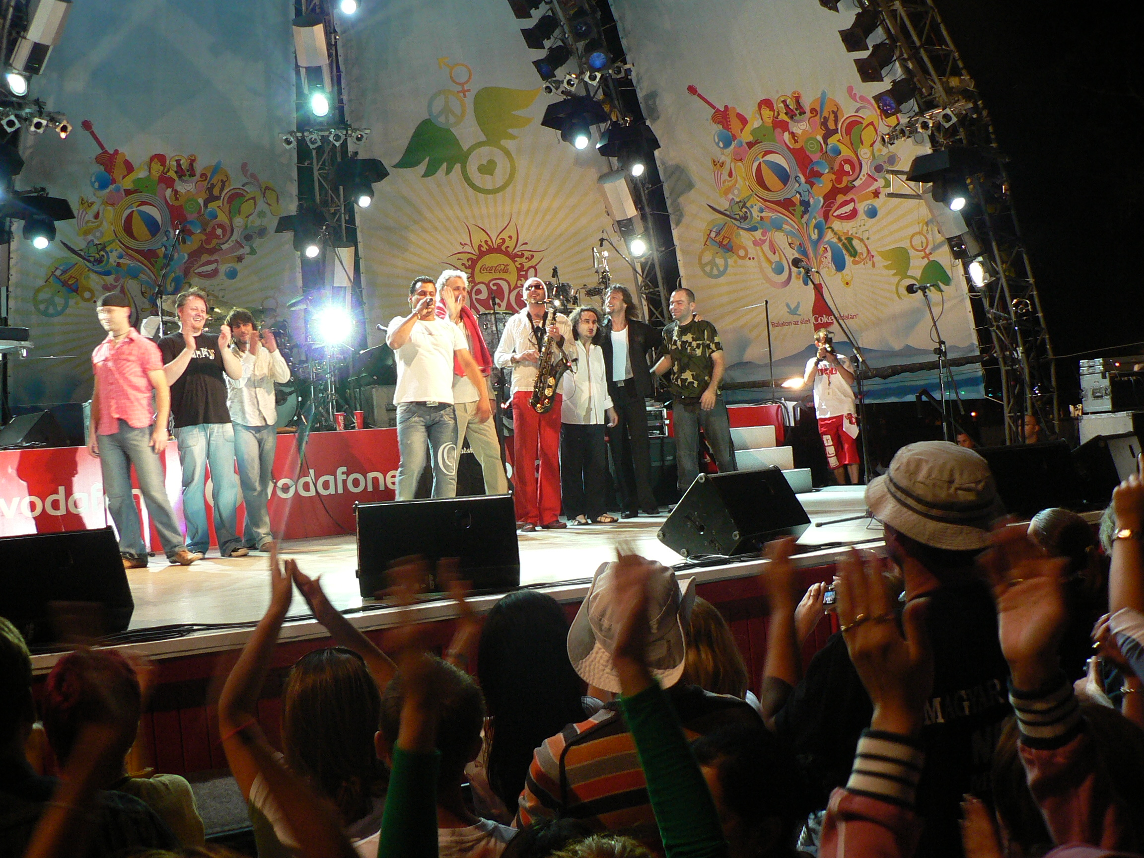 A felvétel 2006. augusztus 5-én készült Siofokon. Beach House. Back II Black koncert. ©© Derzsi Elekes Andor, Budapest 2014, You are authorised to use these photos and vids under Creative Commons – even for commercial, for profit purposes. Photos must be attributed to Derzsi Elekes Andor. All of the photos and vids in the Metapolisz DVD line are under Creative Commons and can be used even for commercial – for profit – purposes. Recommended Citation Derzsi Elekes Andor: Metapolisz DVD line